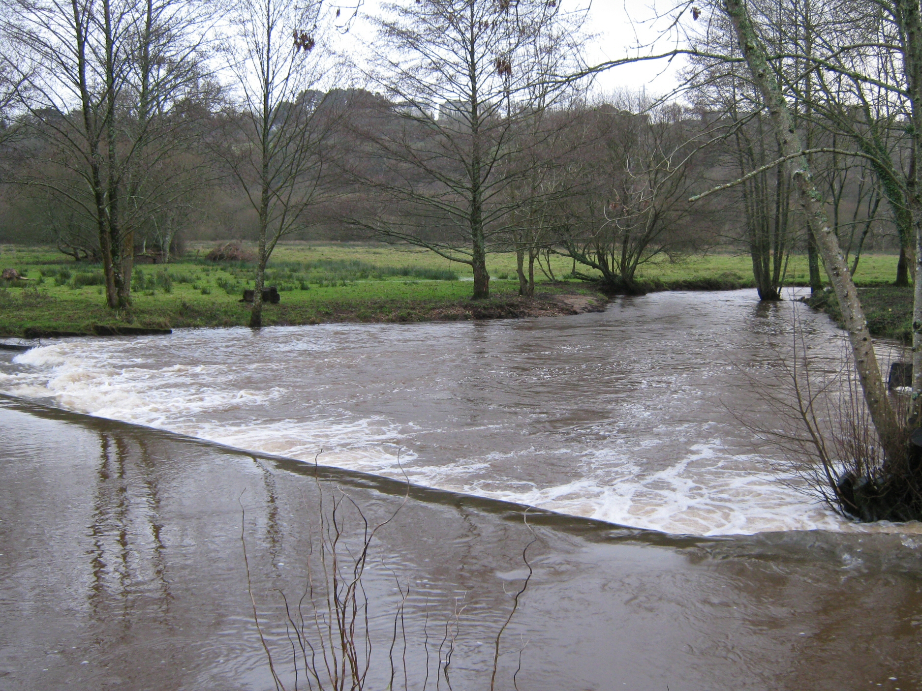 La rivière du Jet en Ergué-Gabéric